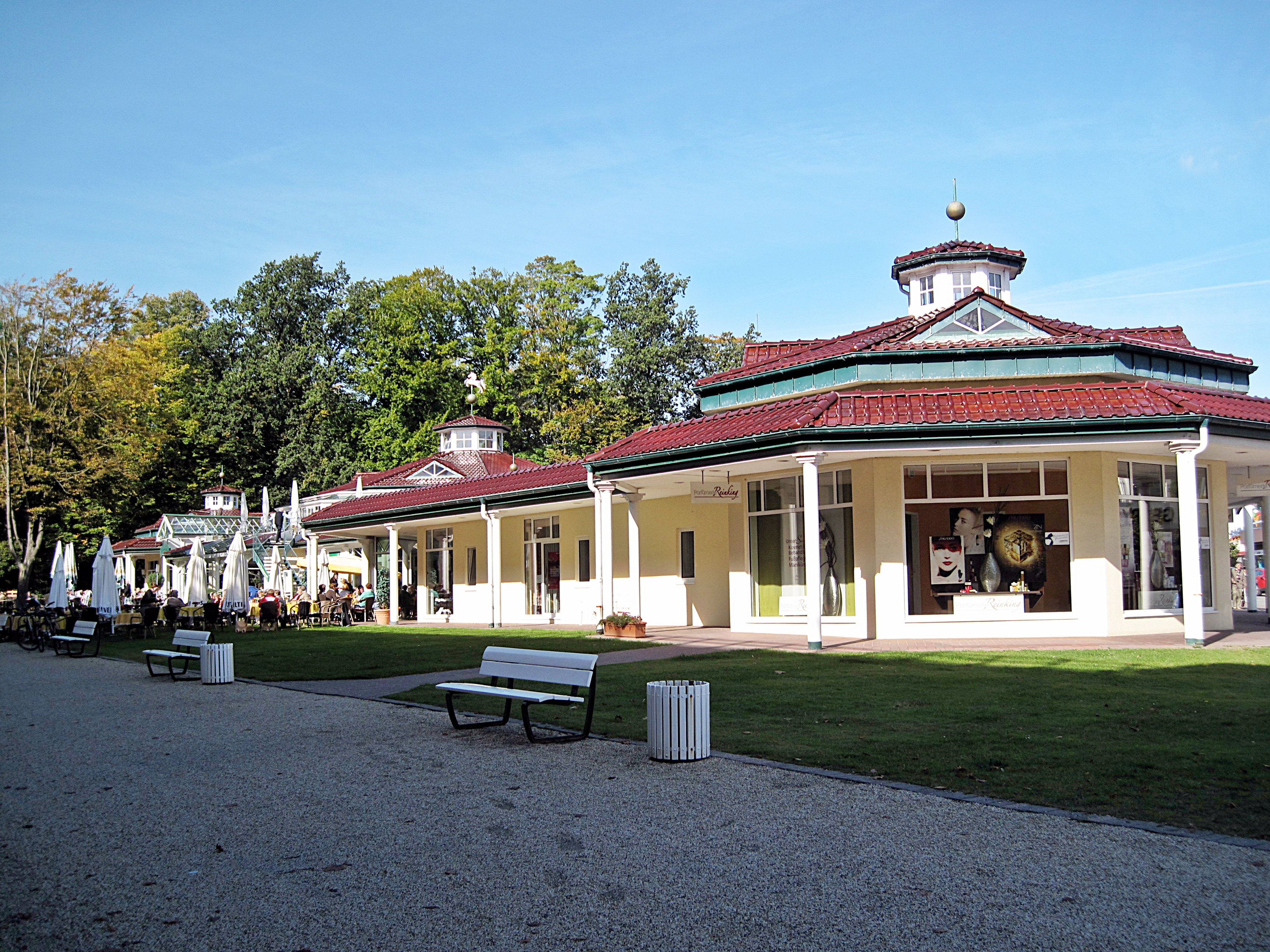 Bad Rothenfelde, Zentraler Fress- und Kauftempel